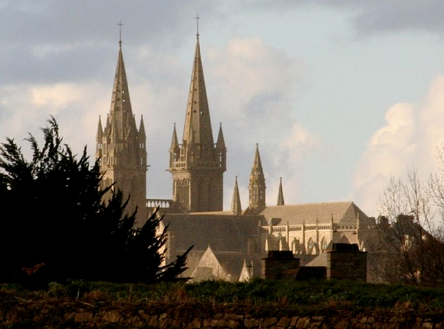 La cathédrale Saint Paul Aurélien à Saint Pol de Léon (Finistère, Bretagne, France) en hiver